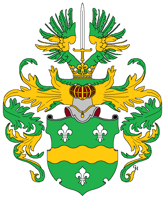 Wappen des österreichisch-ungarischen Offiziers Anton Goldbach (1866–1924), verliehen anlässlich seiner Erhebung in den österreichischen Adelsstand mit dem Prädikat "Edler von Sulittaborn" 1917. Zeichnung von Gerd Hruška ( Für weitere Informationen zu dieser Standeserhebung siehe Arno Kerschbaumer: Nobilitierungen unter der Regentschaft Kaiser Karl I. / IV. Károly király (1916-1921). Graz 2016, ISBN 978-3-9504153-1-5, S. 100 sowie (